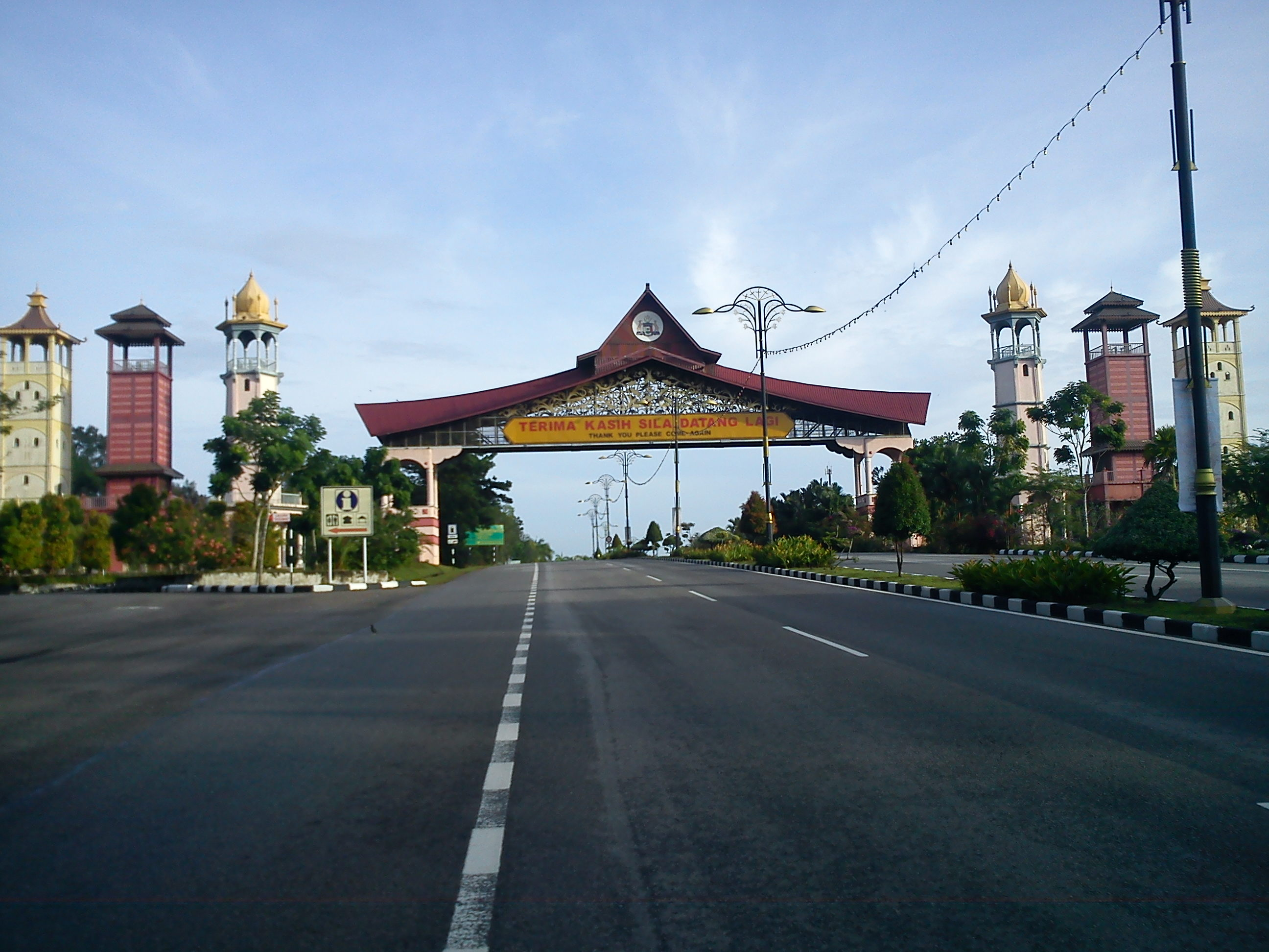 Pintu Gerbang Ayer Keroh terletak pada jalan utama yang menghubungkan tol Ayer Keroh ke Ayer Keroh.